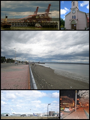 Montaje de Rio Gallegos, Patagonia Argentina